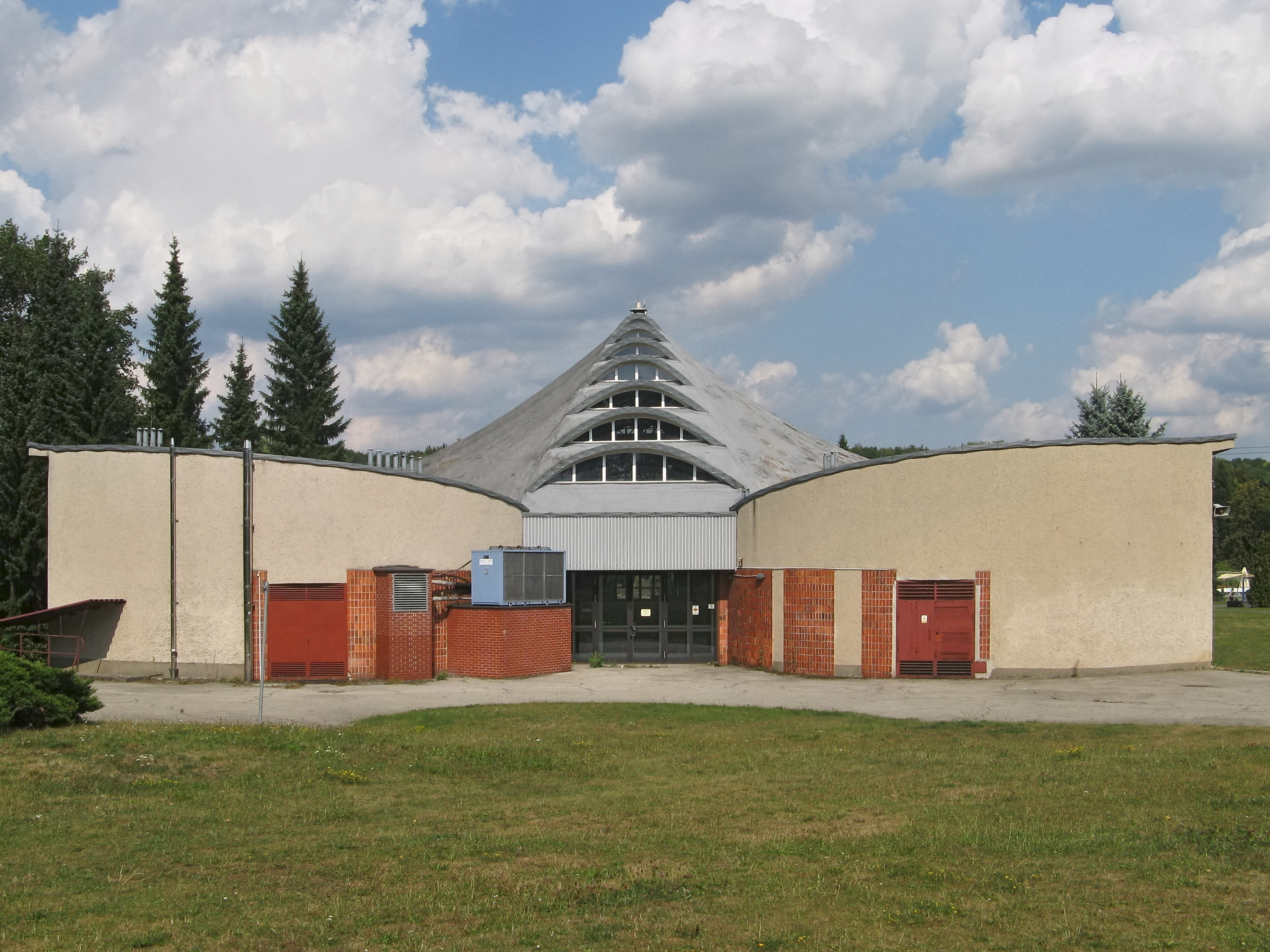 Chorzów, Hala wystawowa Kapelusz Wikidata has entry Q56164790 with data related to this item.